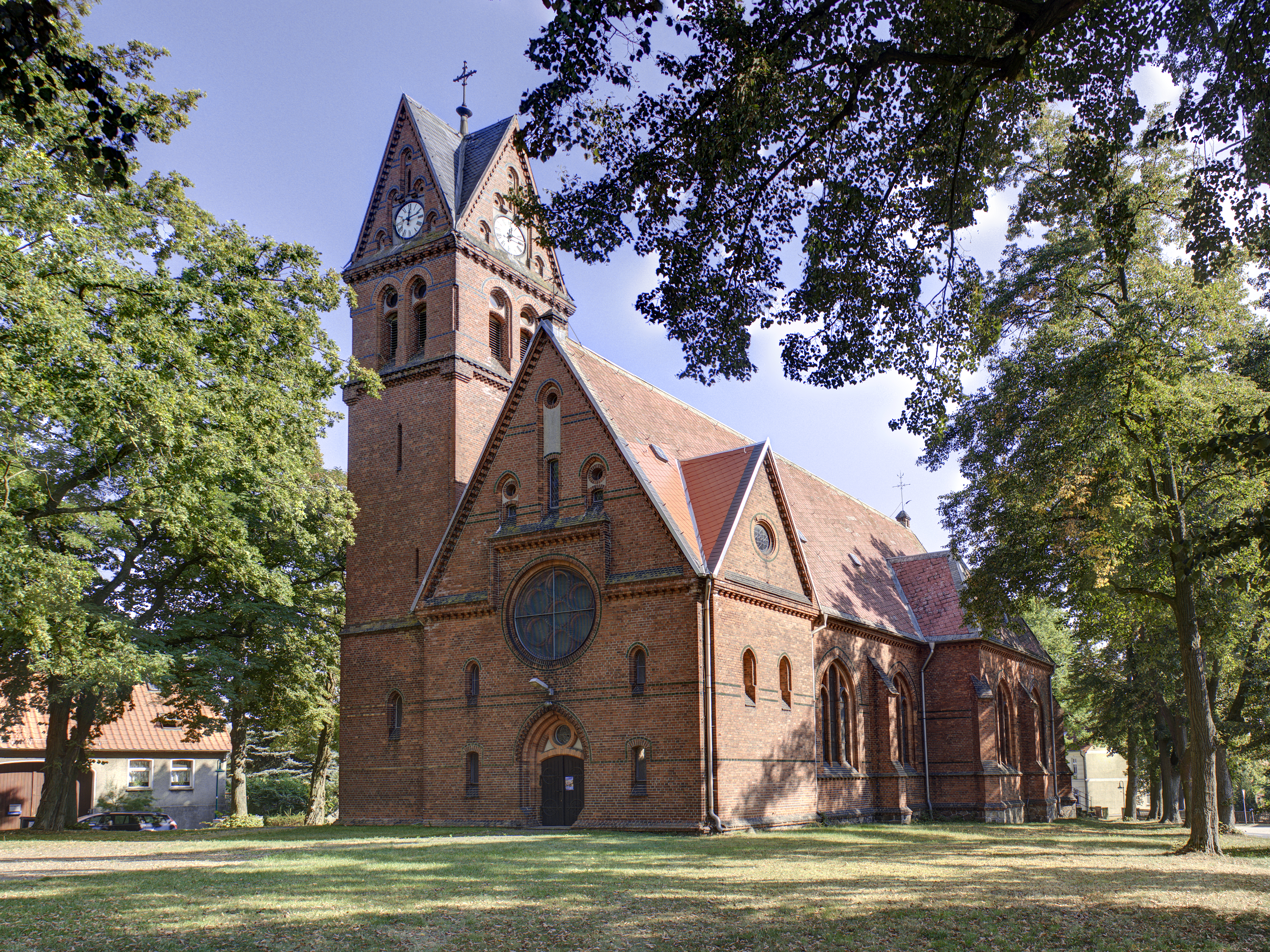 Kirche in Straach, Lutherstadt Wittenberg